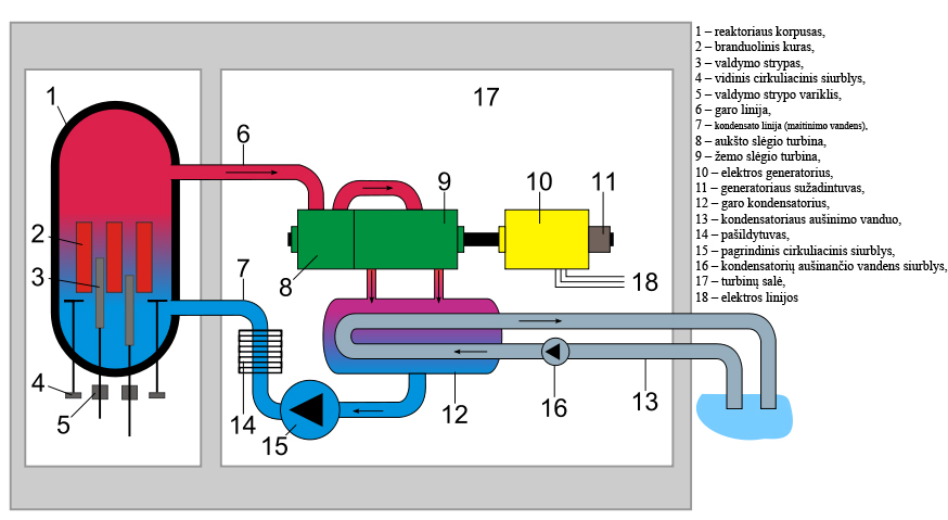 Verdančio vandens reaktoriaus schema